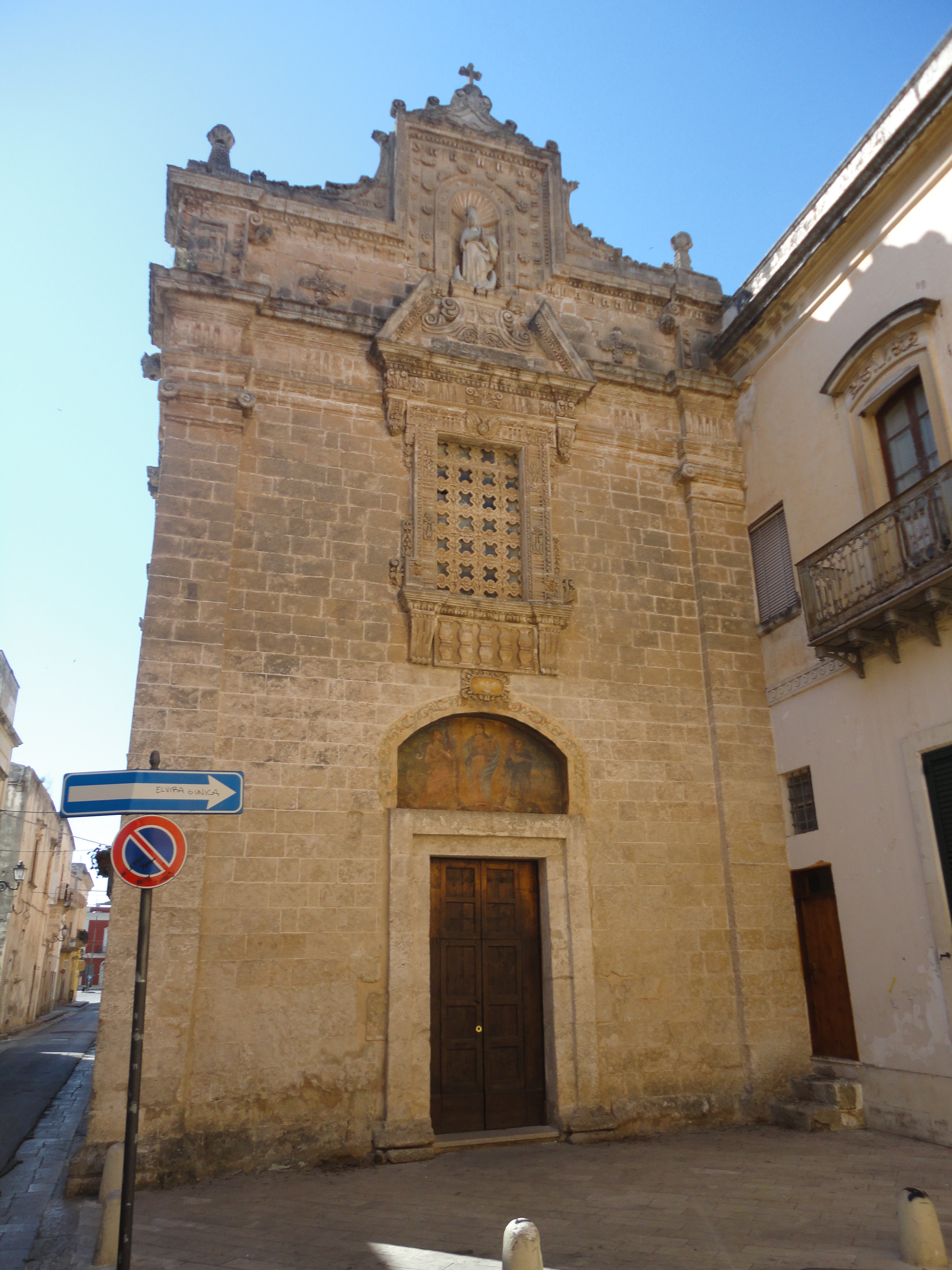 Chiesa di San Giovanni Battista di Galatone, Lecce